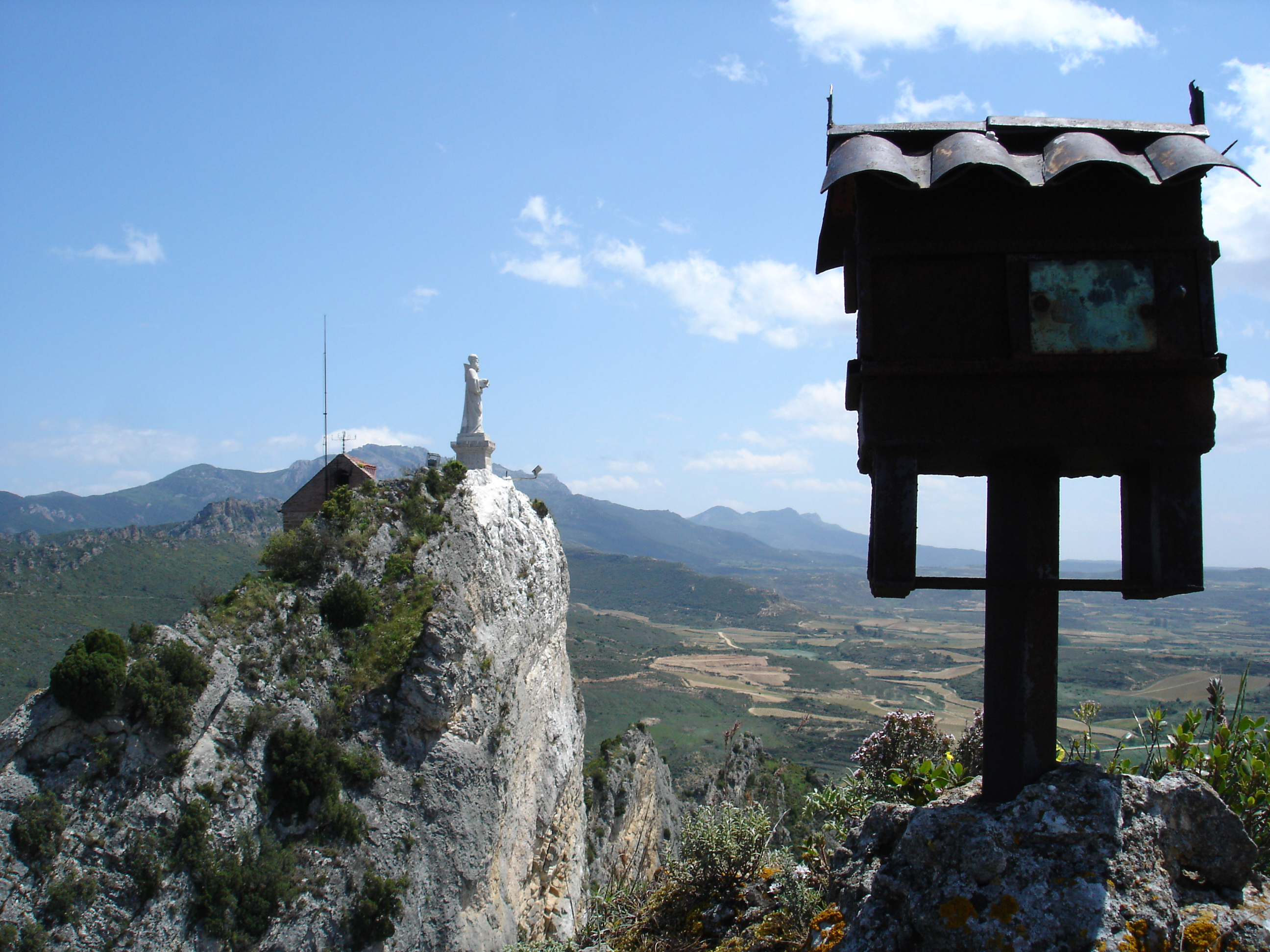 Buzón montañero del Club de Montaña Bilibio Riscos de Bilibio, Haro, La Rioja, España.